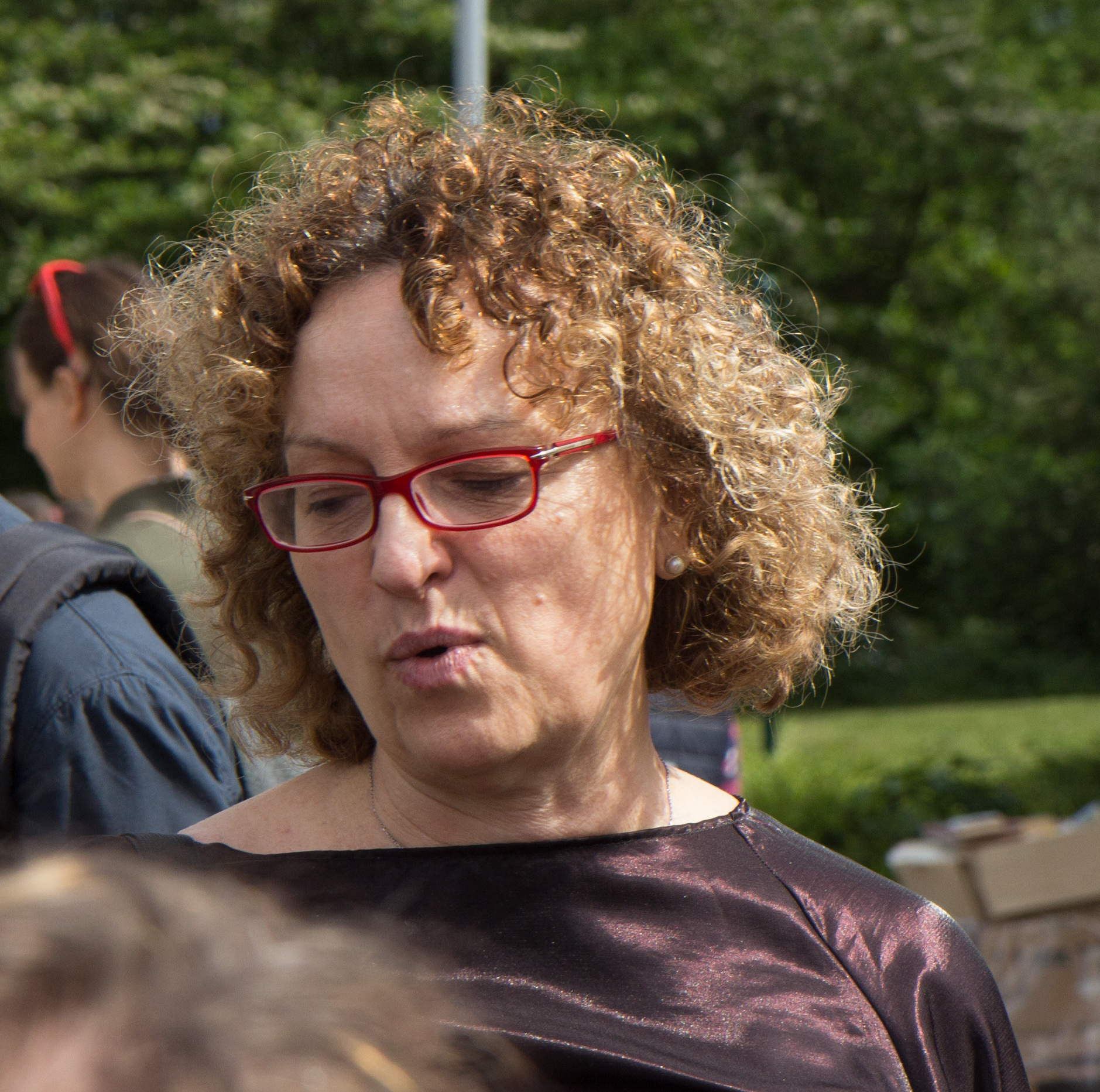 Documenta 14 in Kassel: Hiwa K